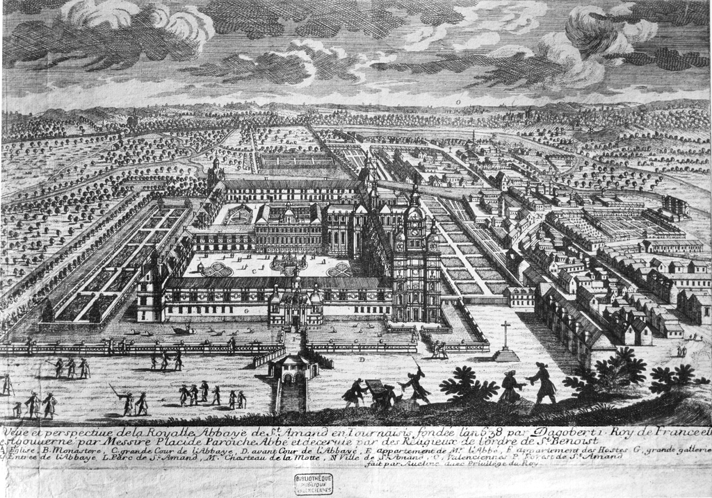 Reproduction d'une gravure ancienne d'Antoine Aveline (vers 1710) sur une carte postale du début du XXe s.